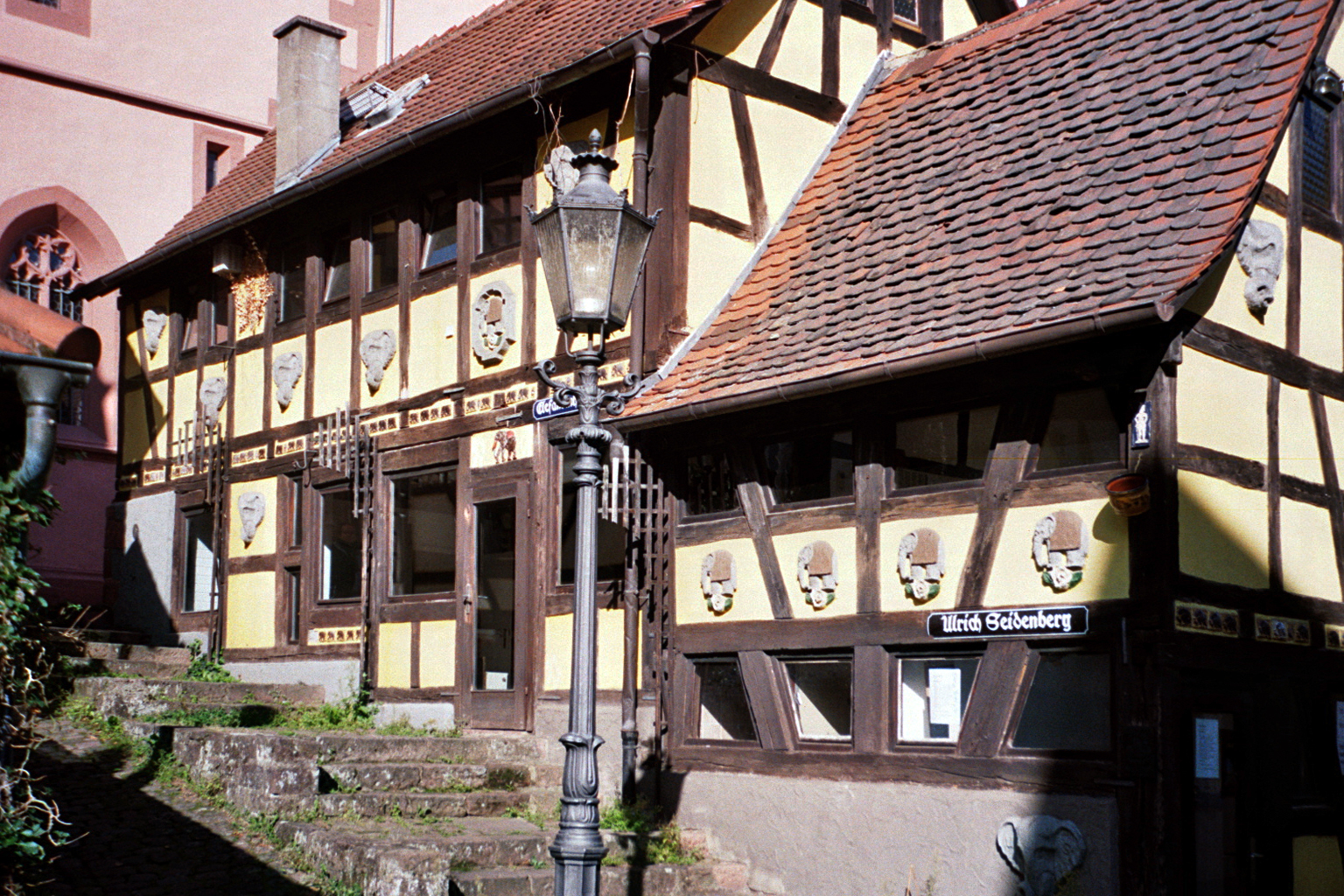 Michelstadt - Elephantenhaus, 16. Jahrhundert